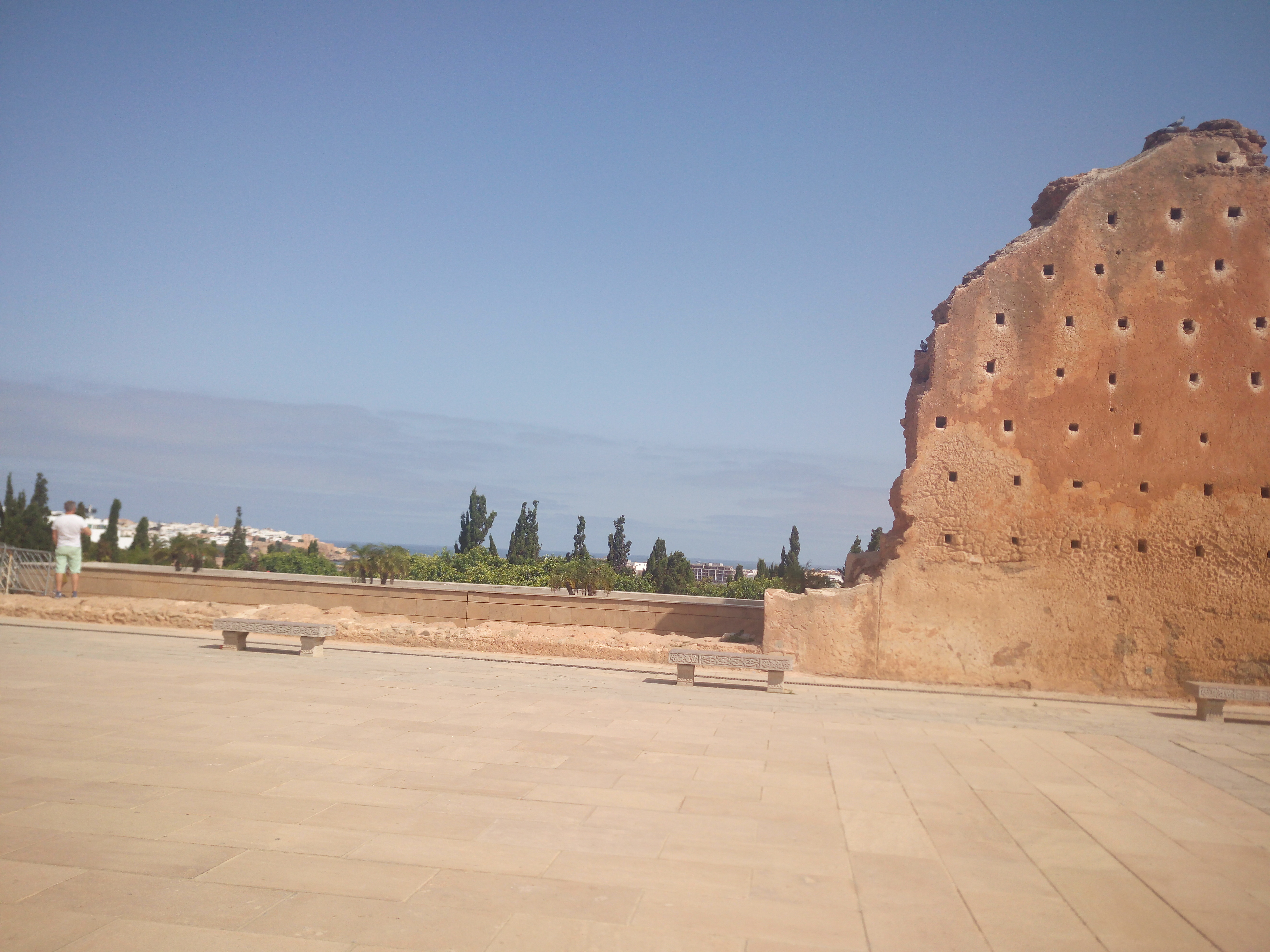 آثار حائط تحطم من اثر الزلزال